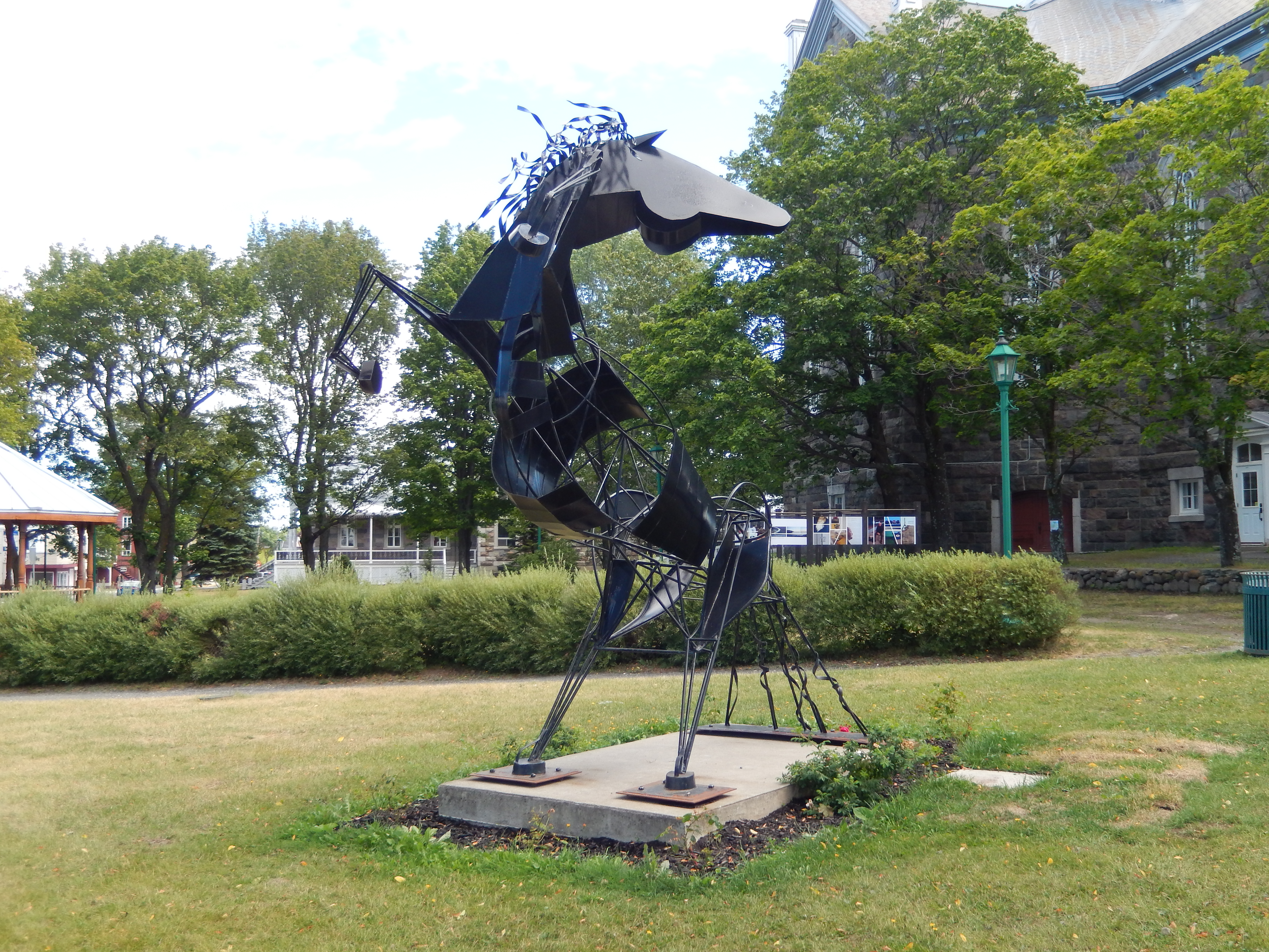 Le Cheval Noir (2007) de Michael Bergstaller.